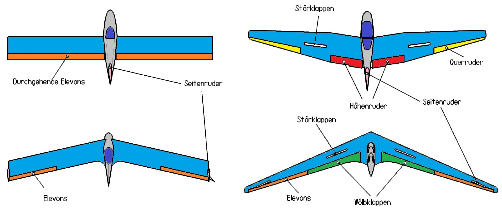 Steuerklappen beim Nurflügel